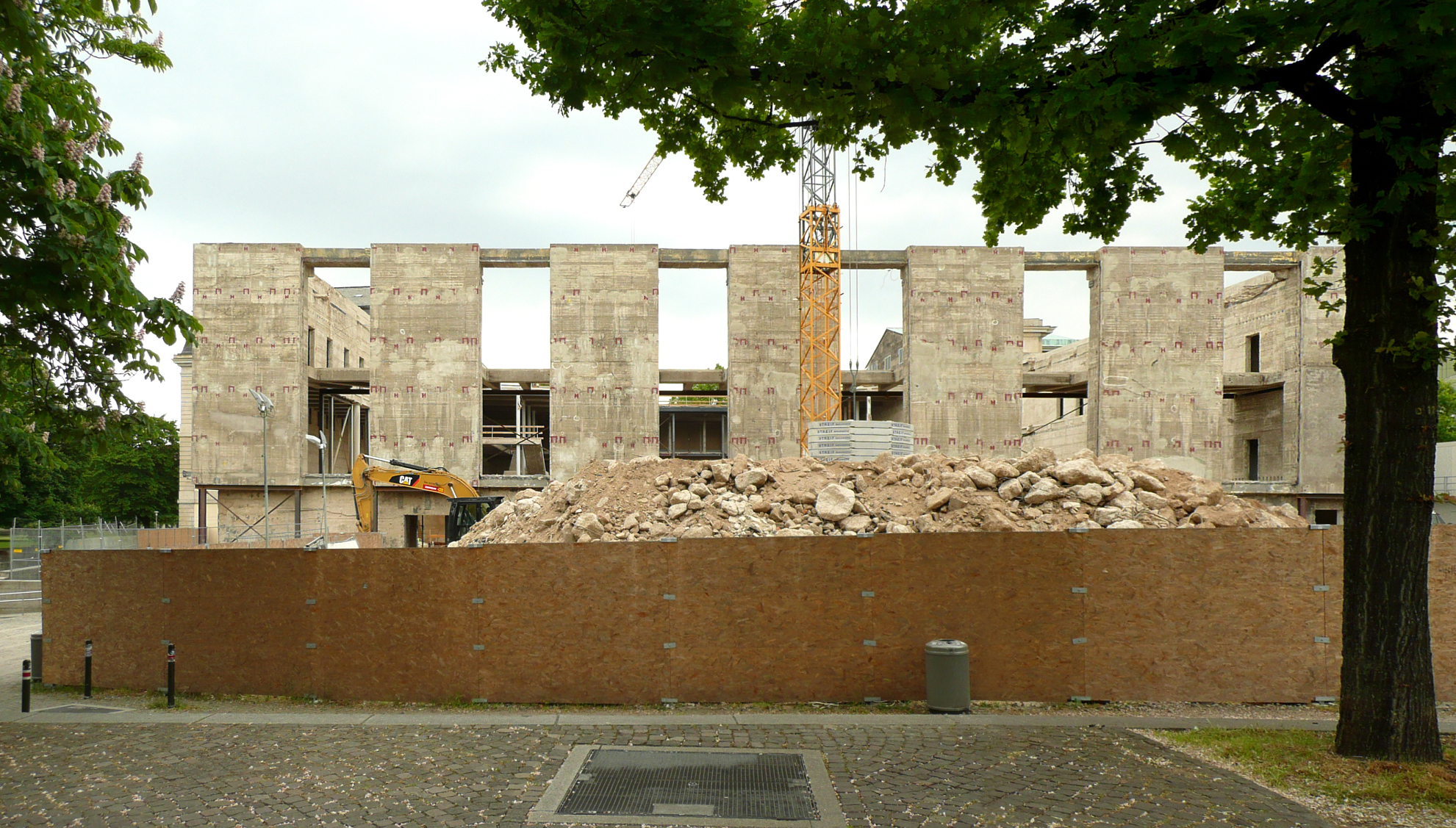 Plenarsaalumbau des Niedersächsischen Landtags